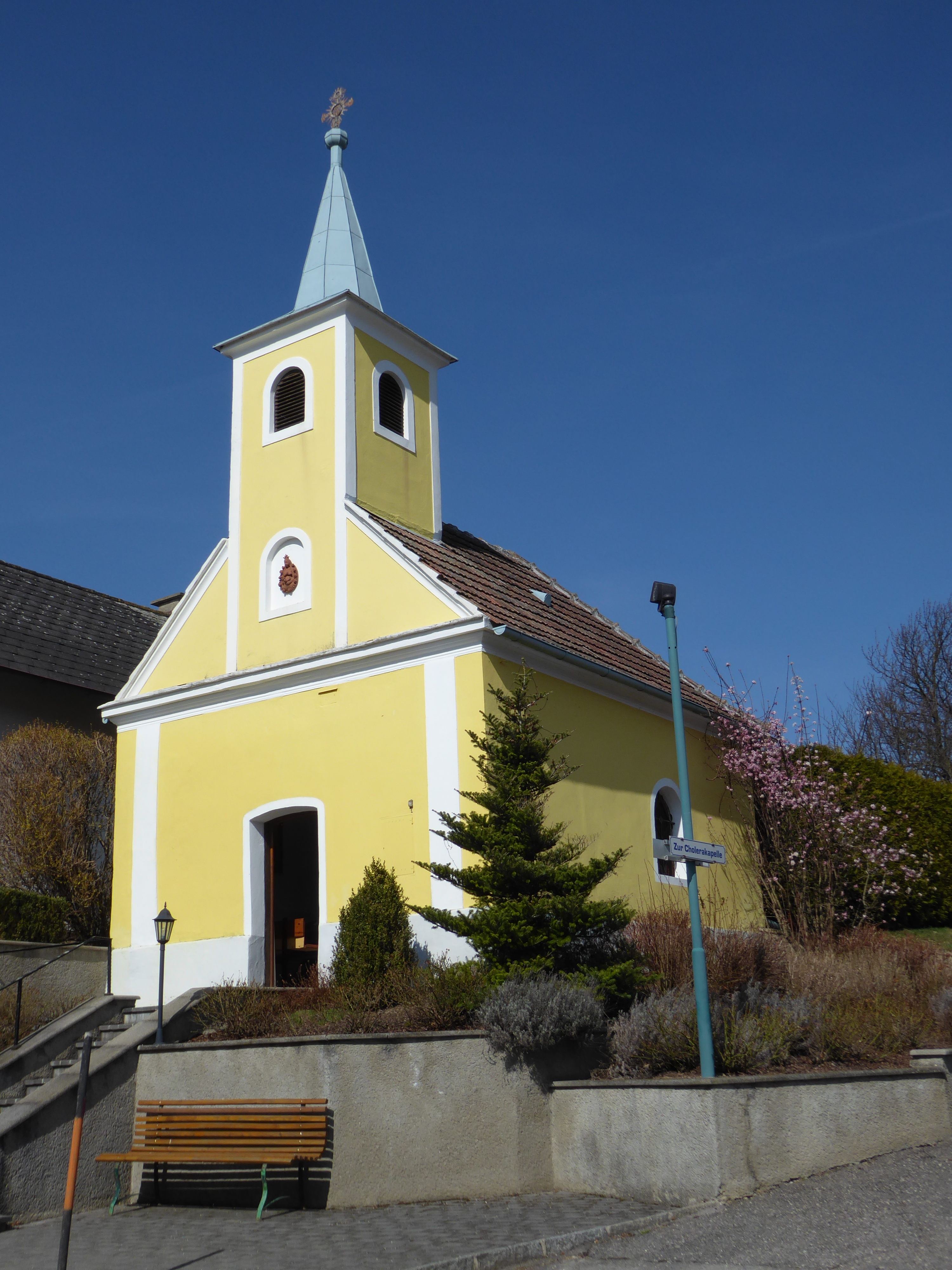 Ortskapelle, Großgraben, Asperhofen, Niederösterreich